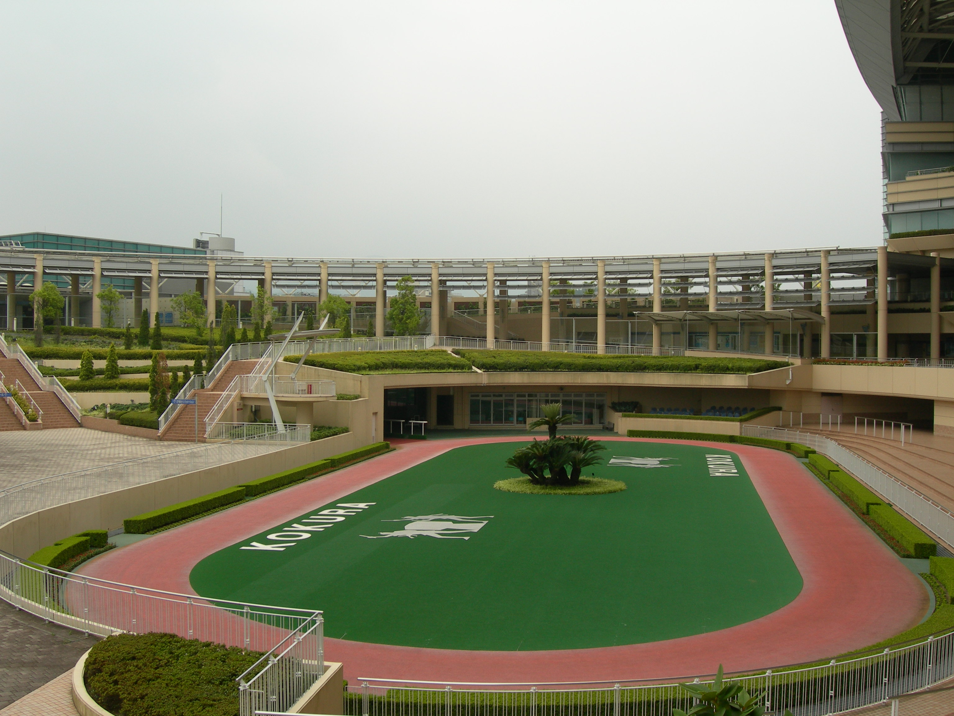 小倉競馬場パドック